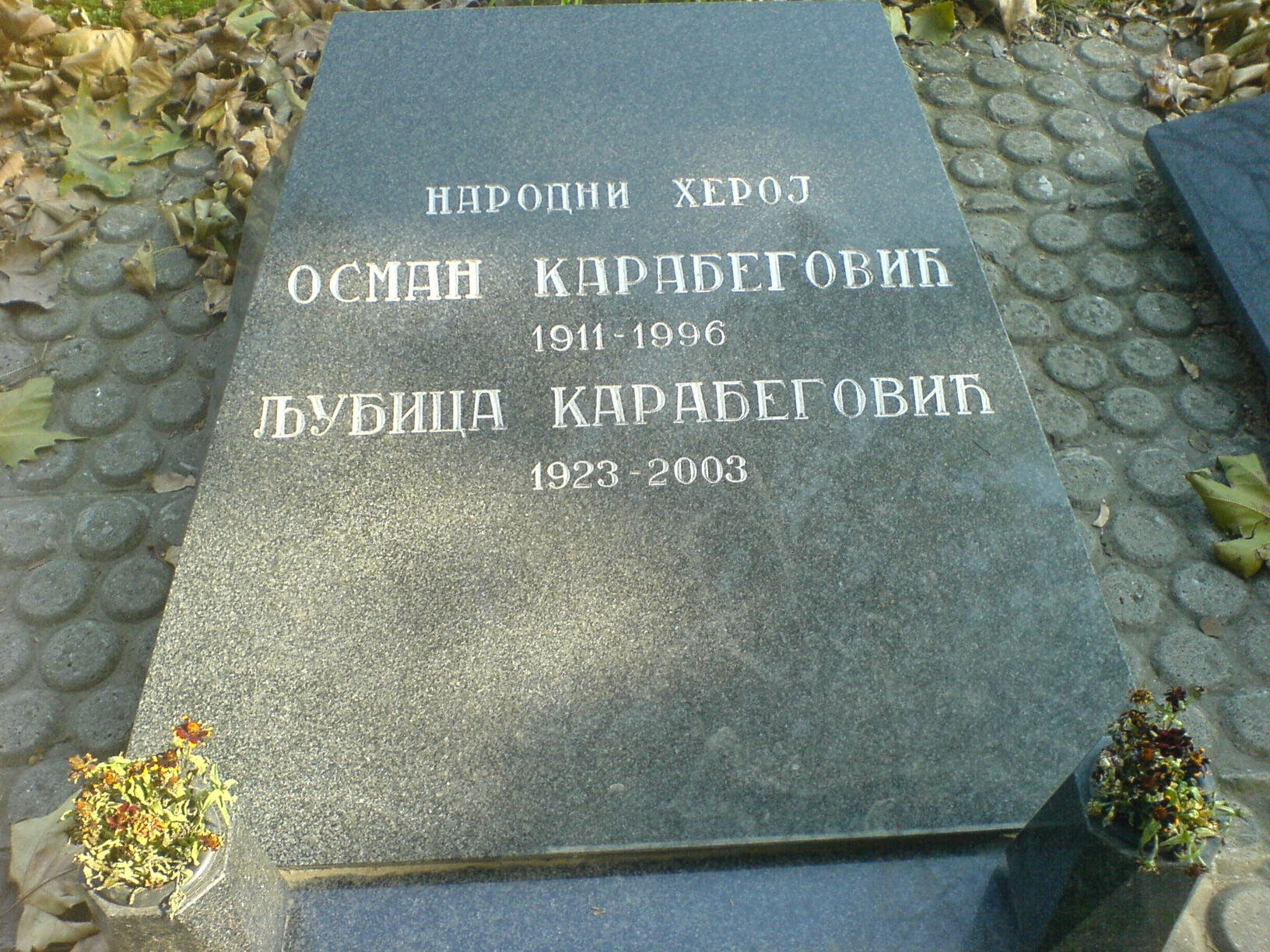 Grob Osmana Karabegovića.